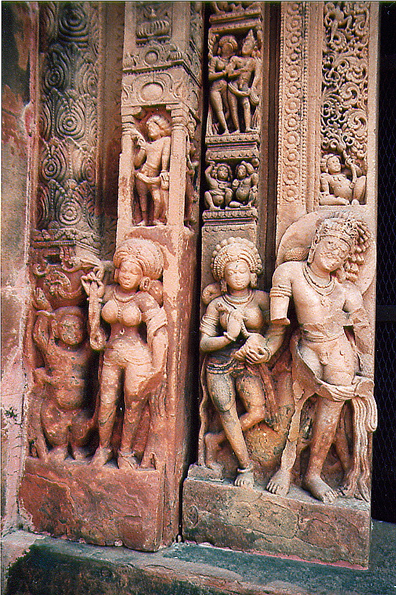 Door_Desavatara Deogarh